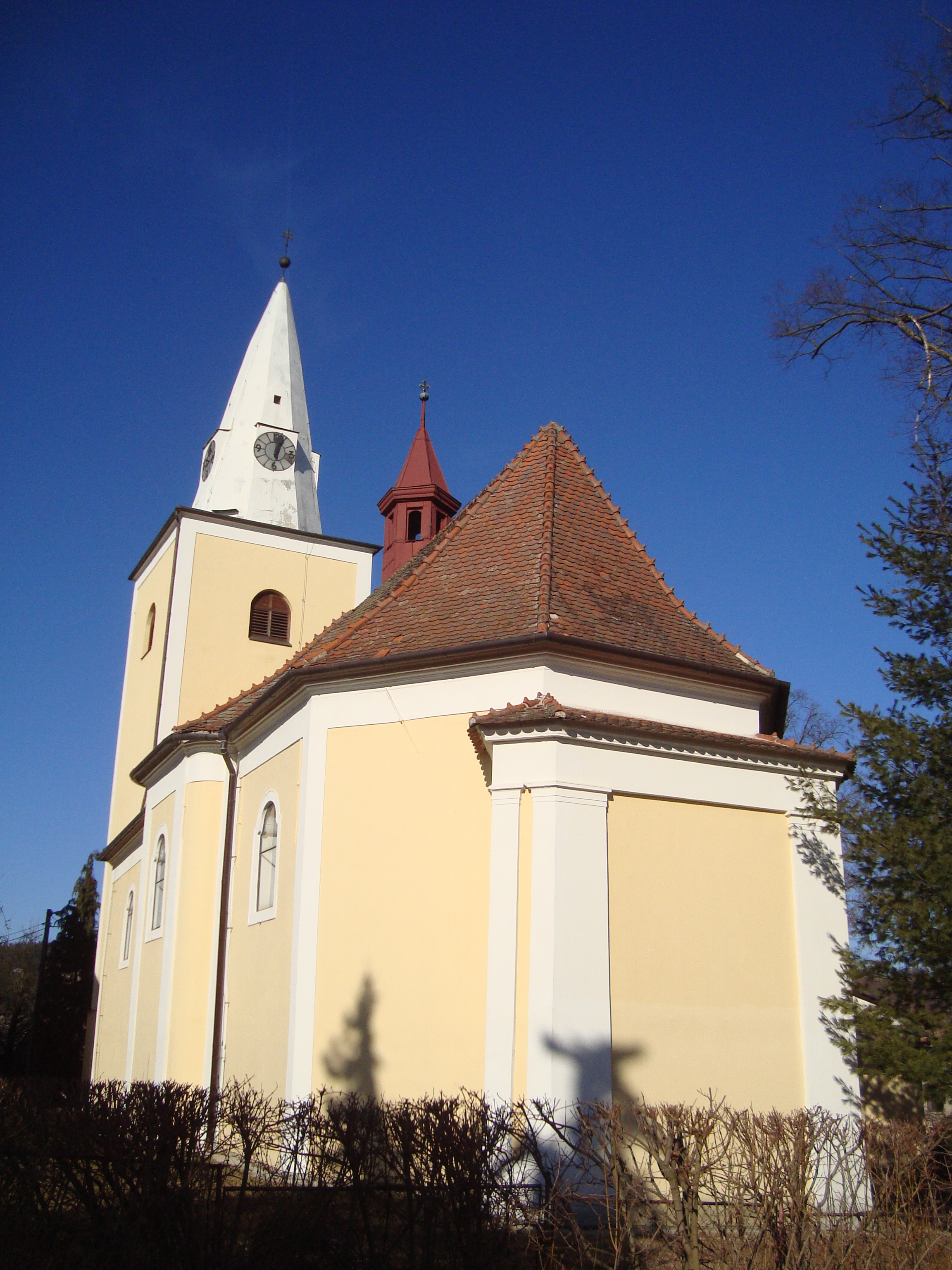 Kostel sv. Mikuláše ve Veverských Knínicích